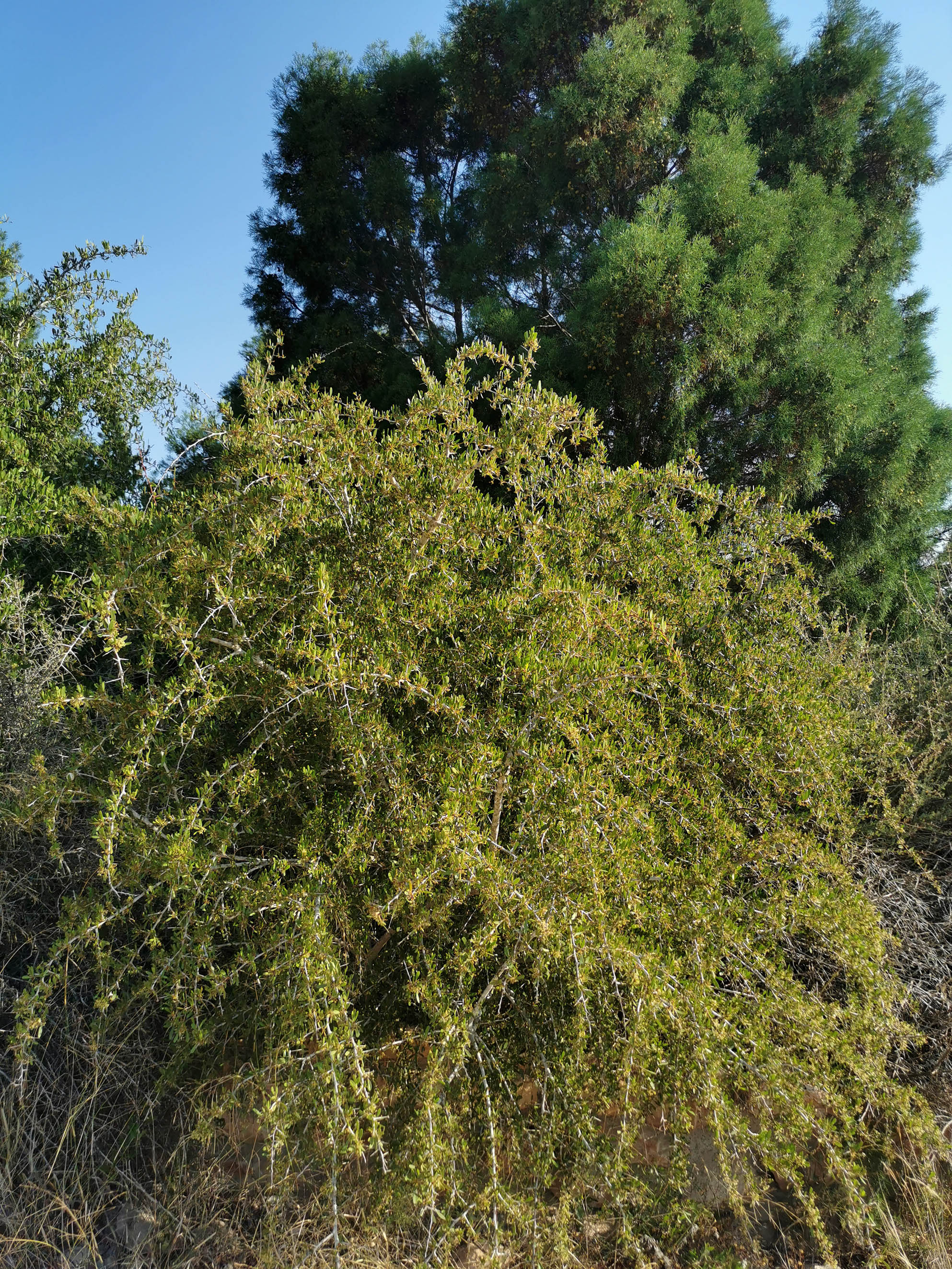 Maytenus senegalensis en el mes de julio. Al fondo, Tetraclinis articulata.